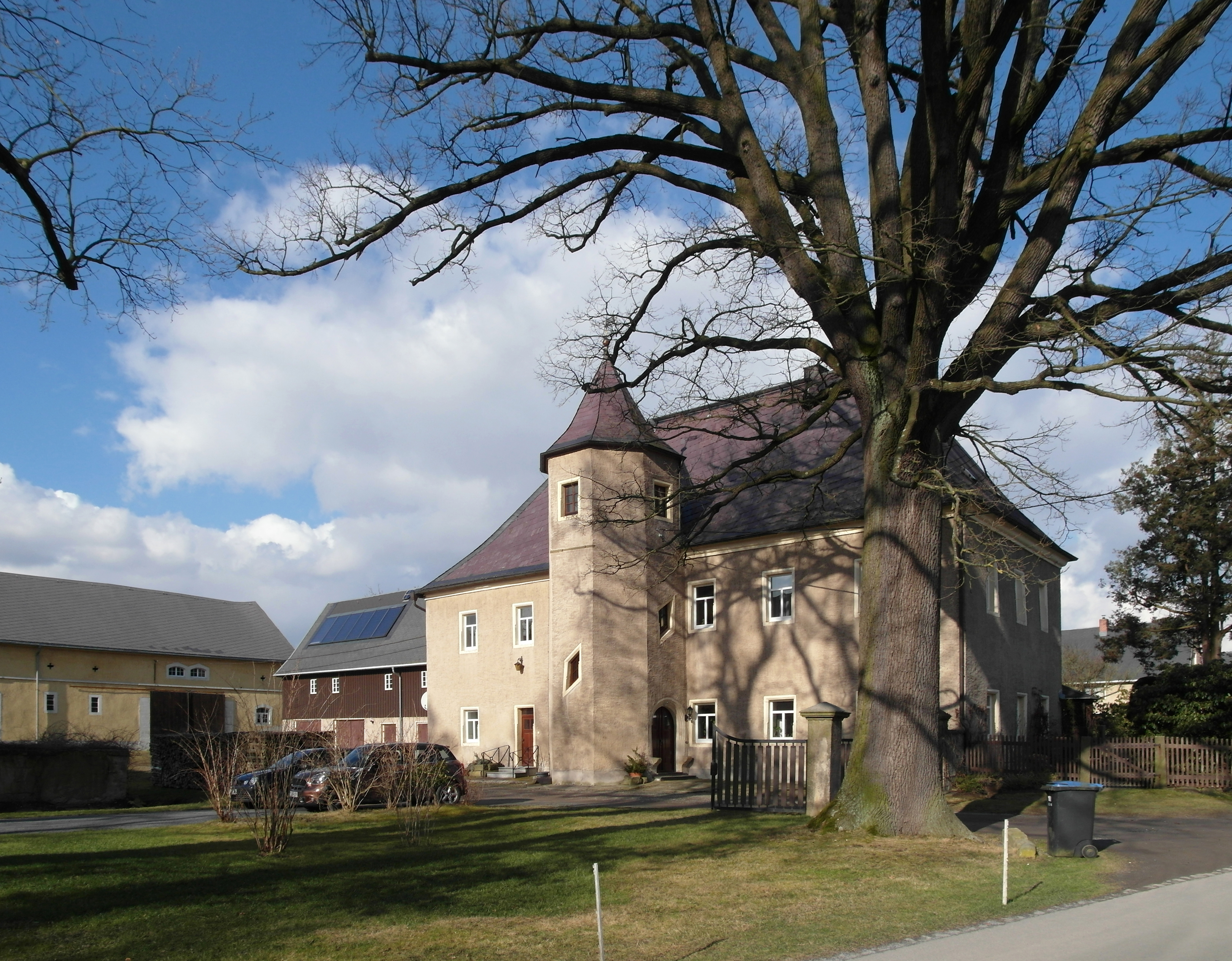 13.02.2018 01833 Rennersdorf (Rennersdorf-Neudörfel, zu Stolpen), Alte Hauptstraße 9 (GMP: 51.060049,14.065185): Erblehngericht Rennersdorf, Sicht von Südosten. [SAM3980.JPG]20180313400DR.JPG(c)Blobelt